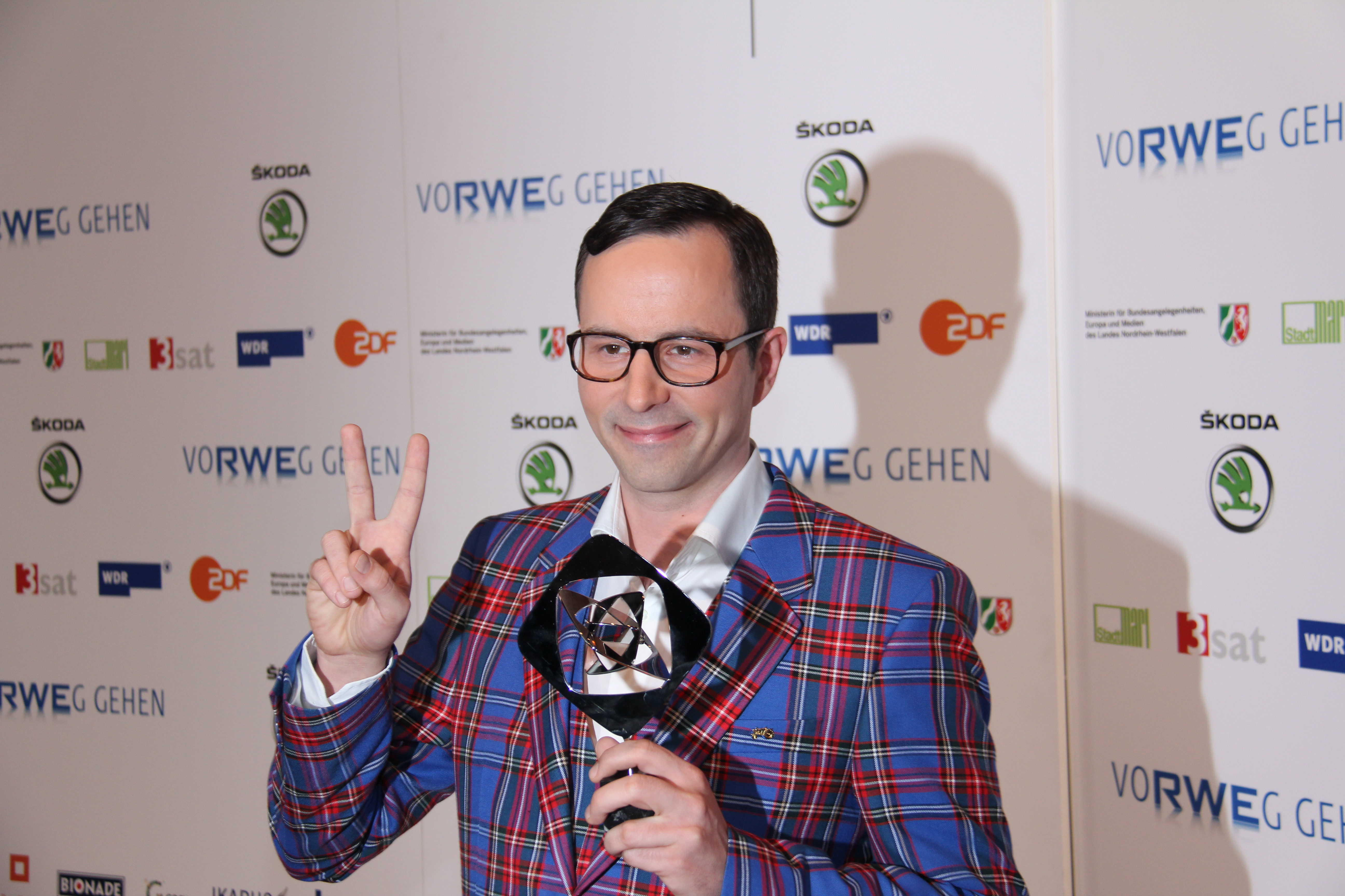 Grimme-Preisträger Kurt Krömer bei der Verleihung 2011